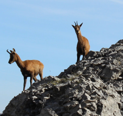 Rebecos en la montaña leonesa